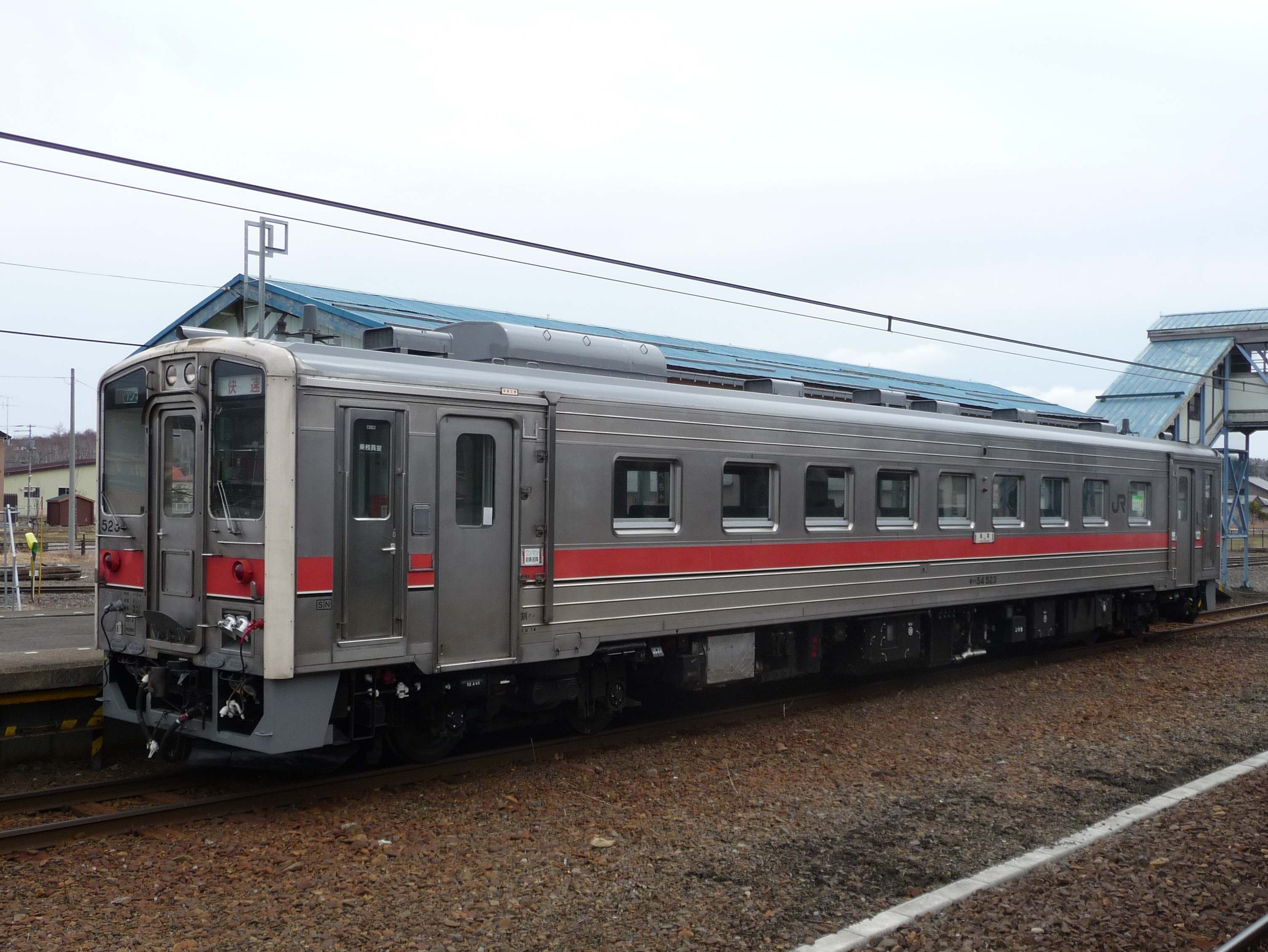 JR北海道キハ54形気動車（キハ54 523）JR北海道釧網本線、標茶駅で撮影